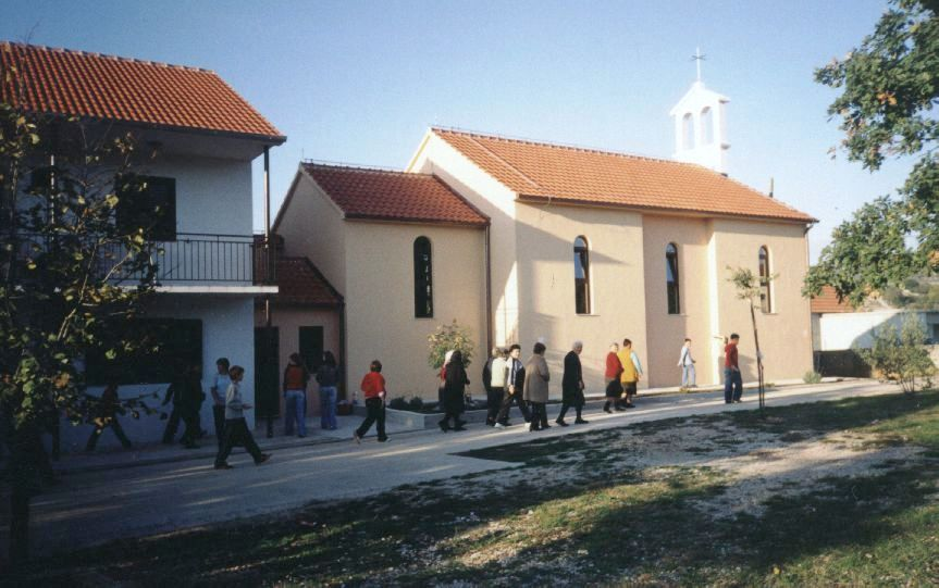 Kostel v Donjem Sitnu v Chorvatsku, dokončený v roce 1989